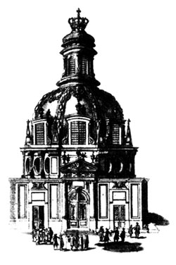 Théâtre anatomique de l'académie de chirurgie de Paris.